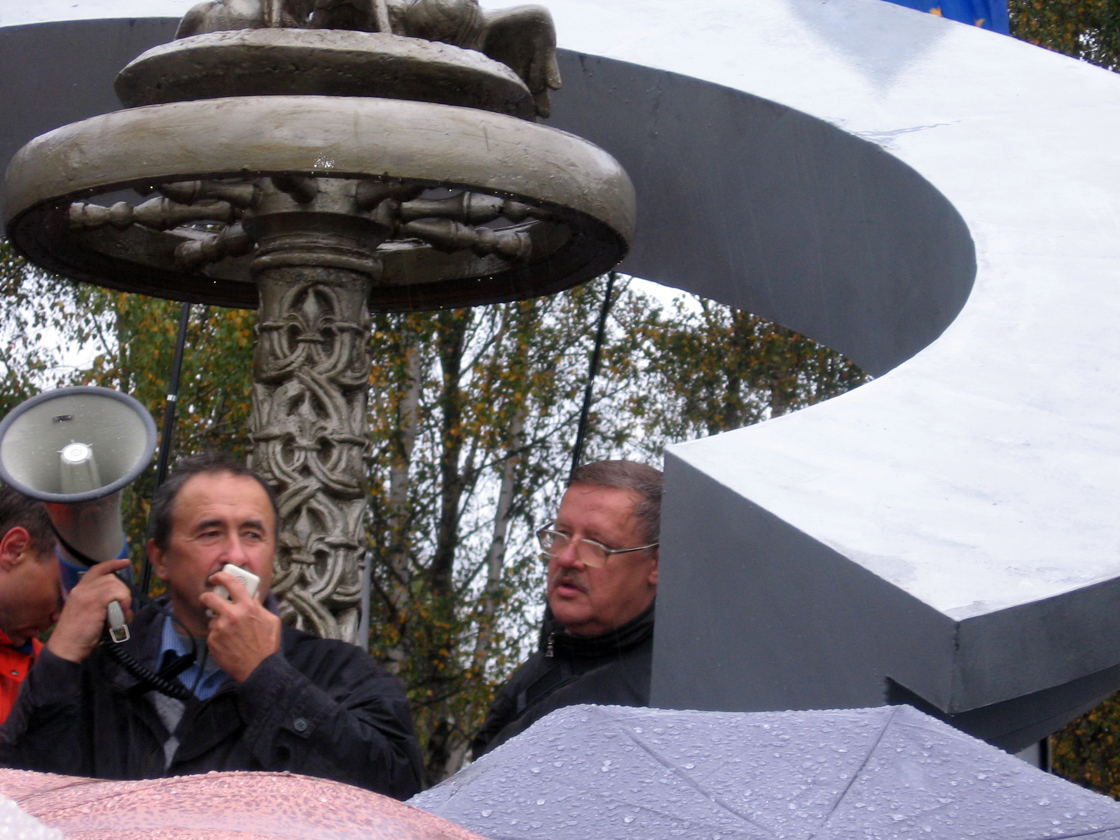 Ораторы, вынужденные по причине отбора звуковой аппаратуры, выступать через мегафон. Справа - сопредседатель оргкомитета по проведению Народного схода – Виктор Ивашкевич